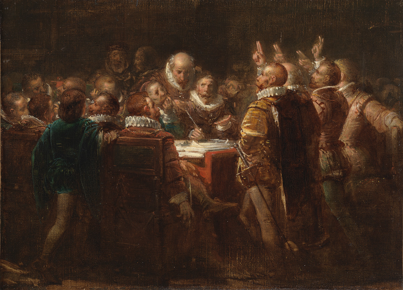 schilderij; tachtigjarige oorlog; Vos, Jacob de; geschiedenis (iconografie)